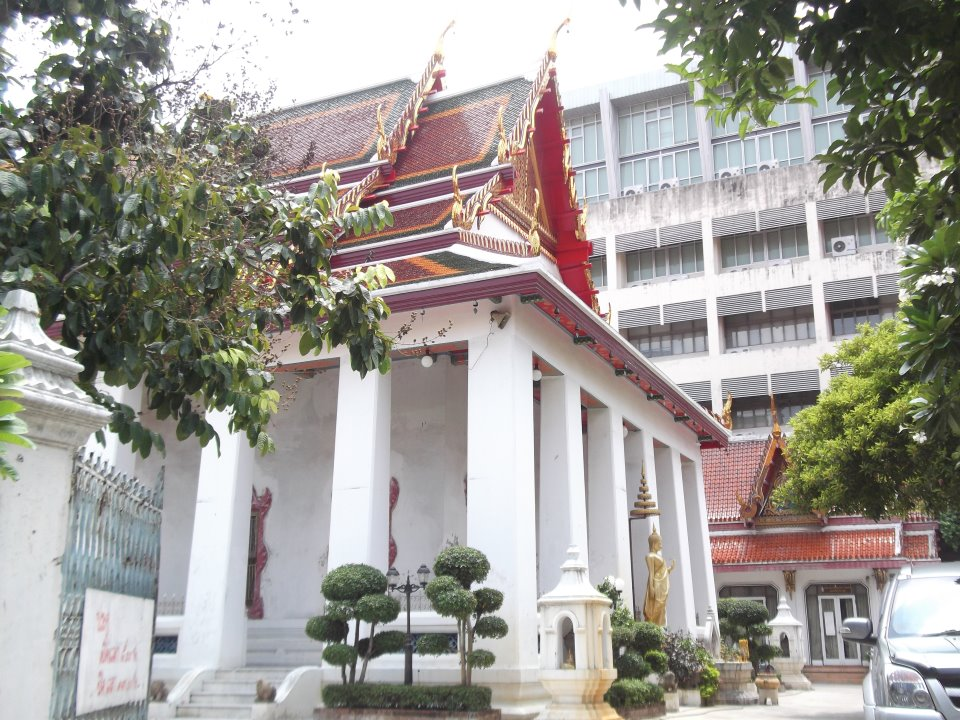 วัดบพิตรพิมุข